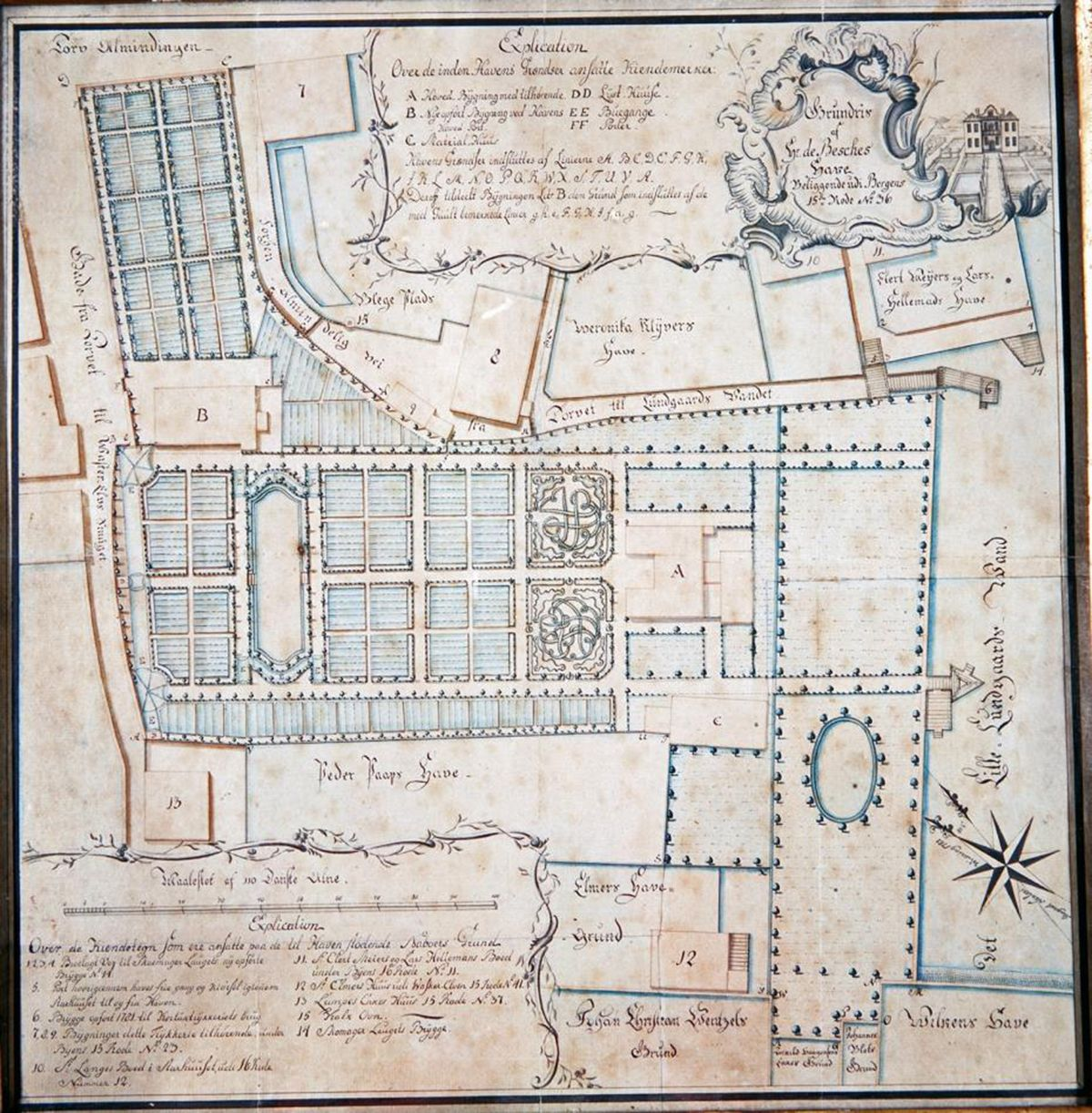 Kart over urtehagen til apotekerfamilien de Besche i Bergen. Hagen lå der Torgallmenningen ligger i dag.